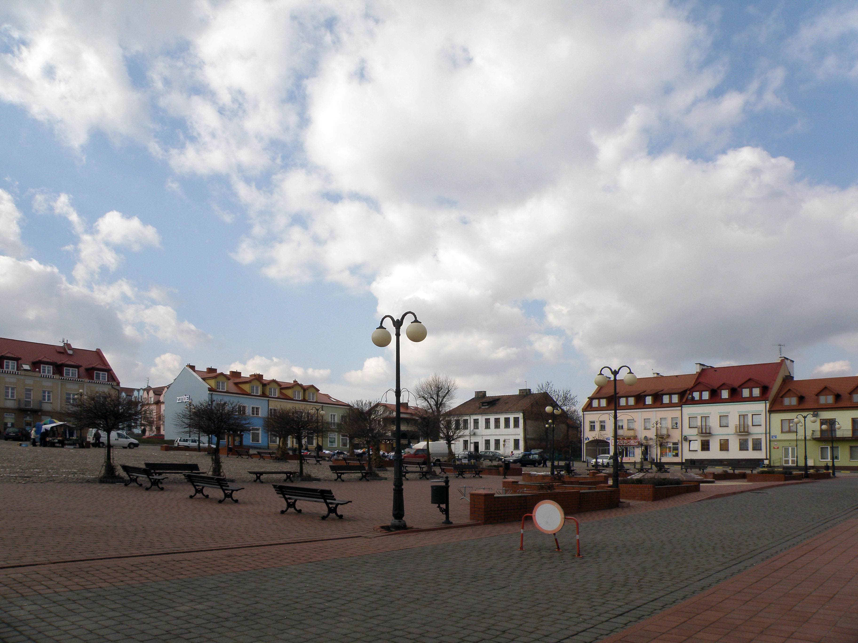 Serock (woj. mazowieckie, powiat legionowski) - Rynek